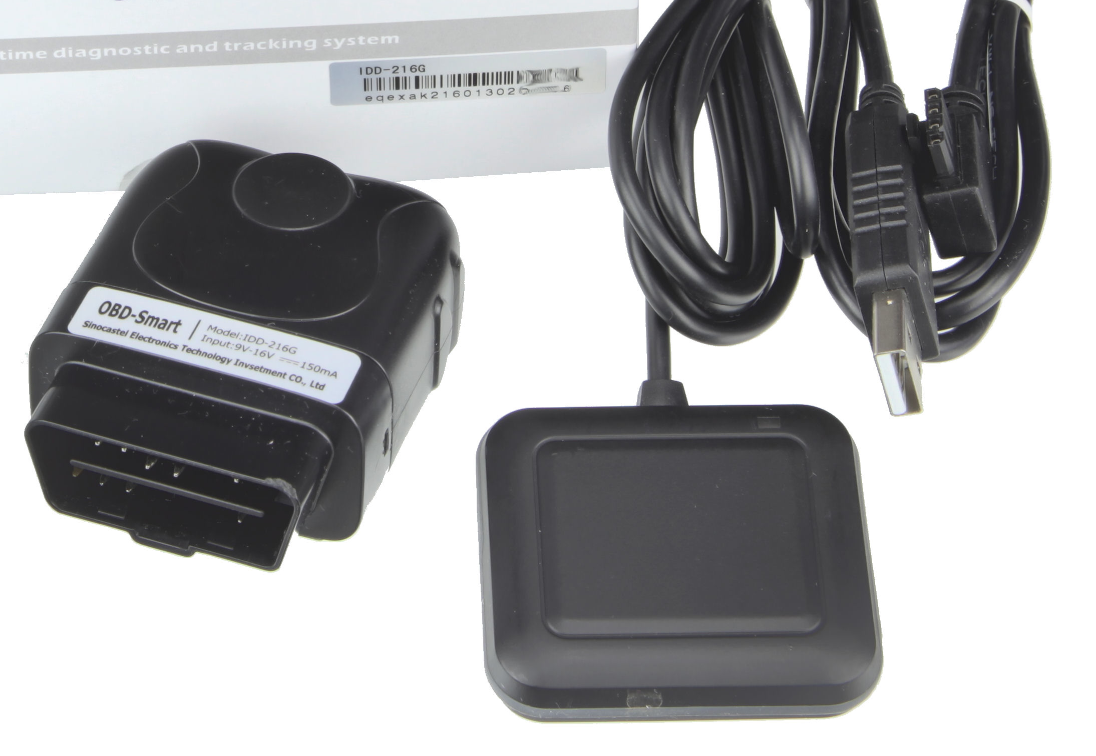 Castel IDD-212G OBD-Guard Tracker Flottenmanagement inkl. GPS-Antenne und Datenkabel